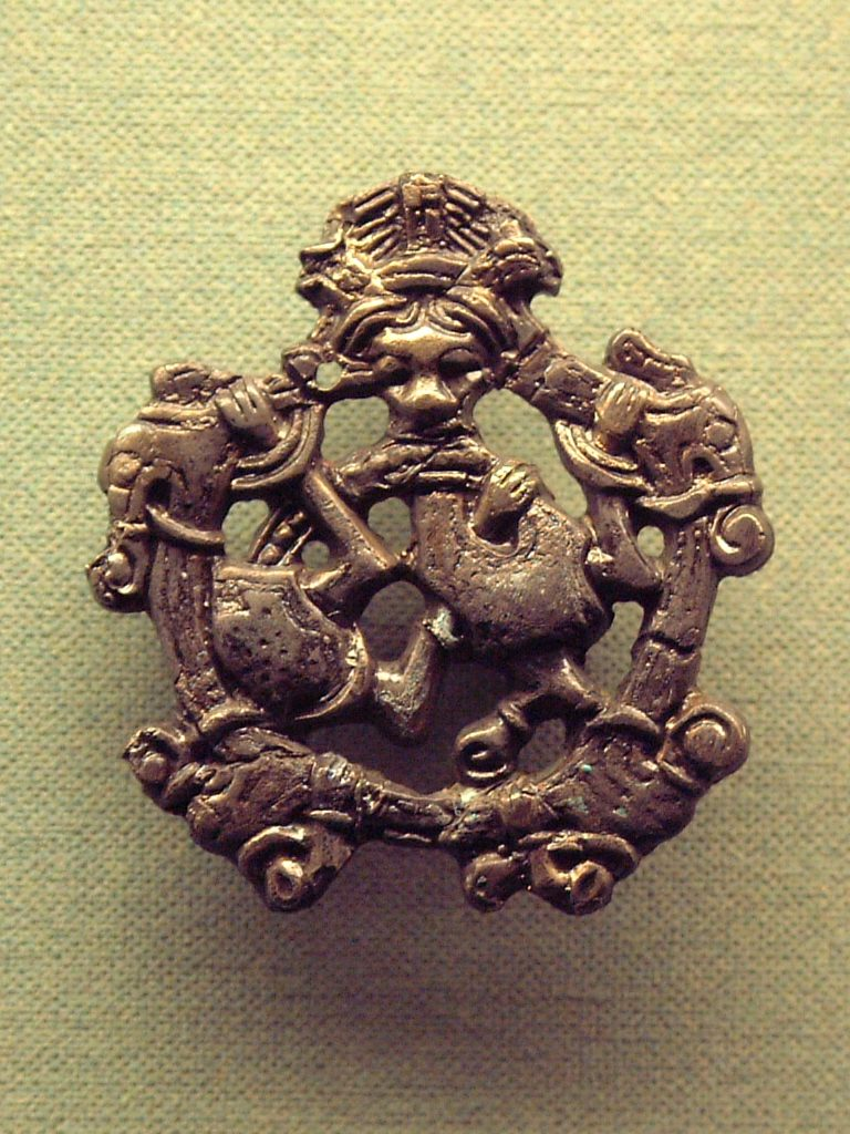 Eine in Haithabu gefundene, fein gearbeitete bronzene Gewandfibel mit einem Greiftier im Borrestil.